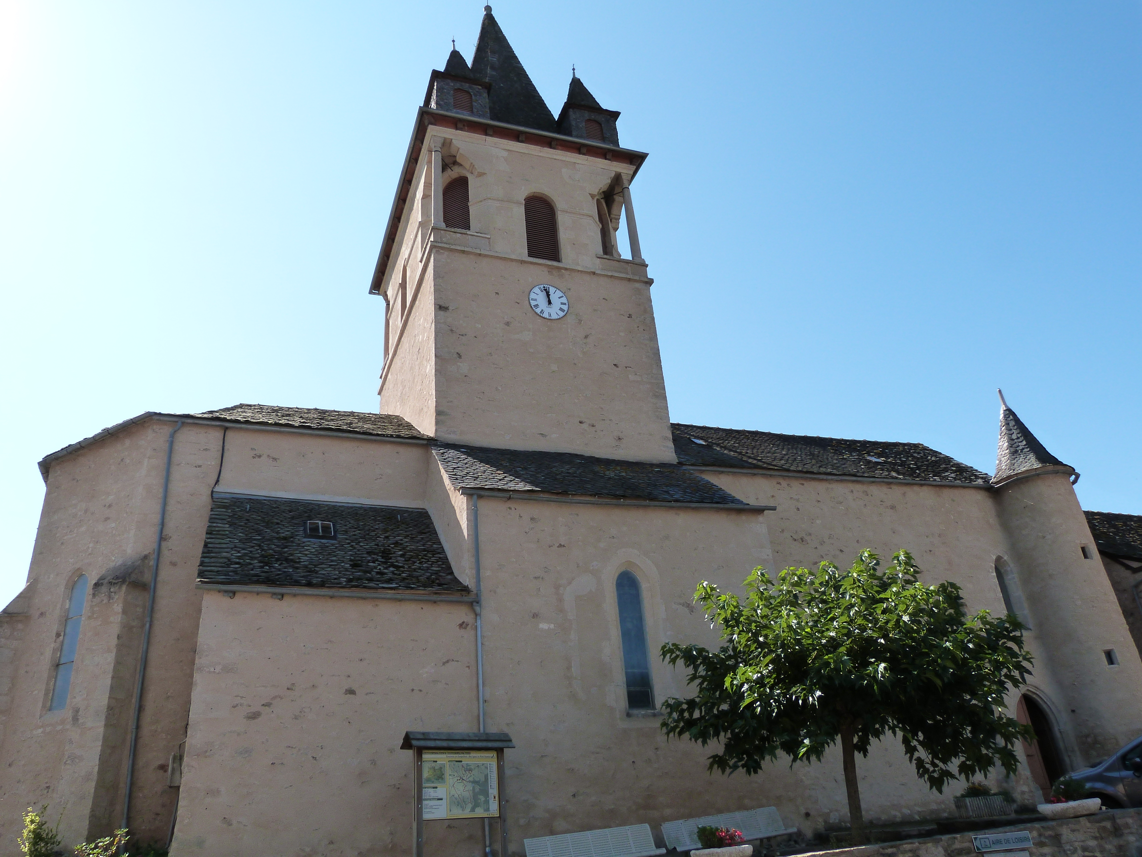 Façade nord de l'église